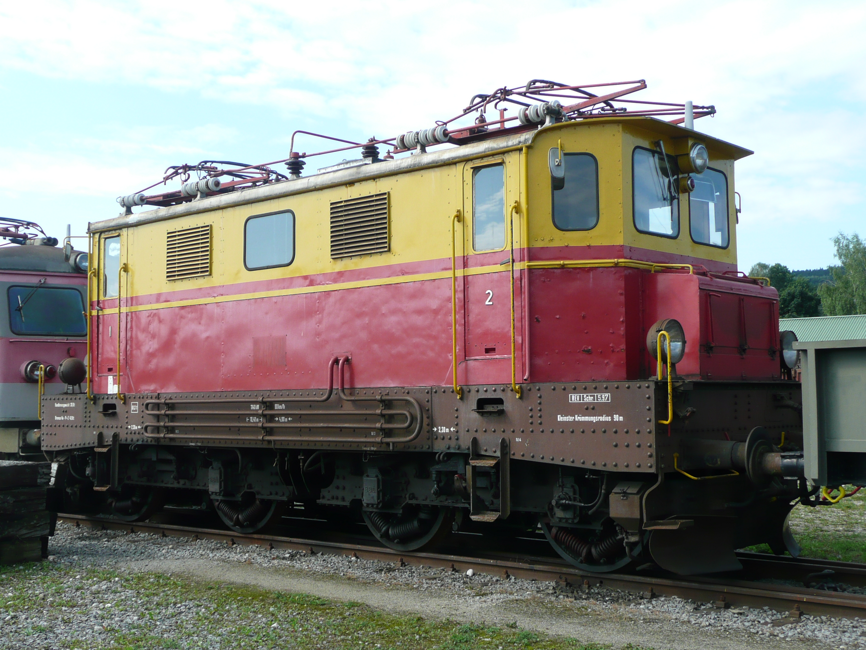 1045.003 im Eisenbahnmuseum Ampflwang